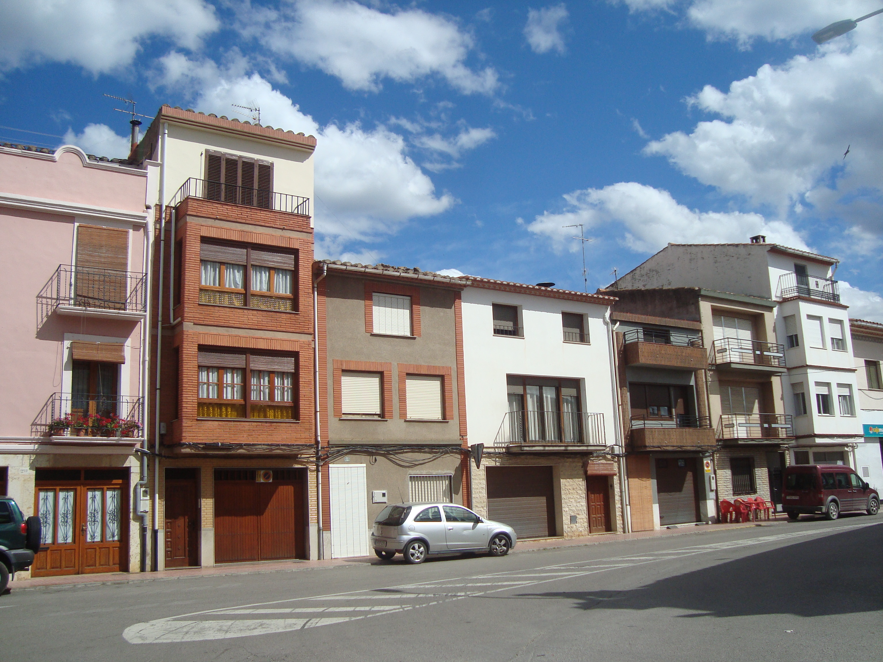 Calle de Albocàsser